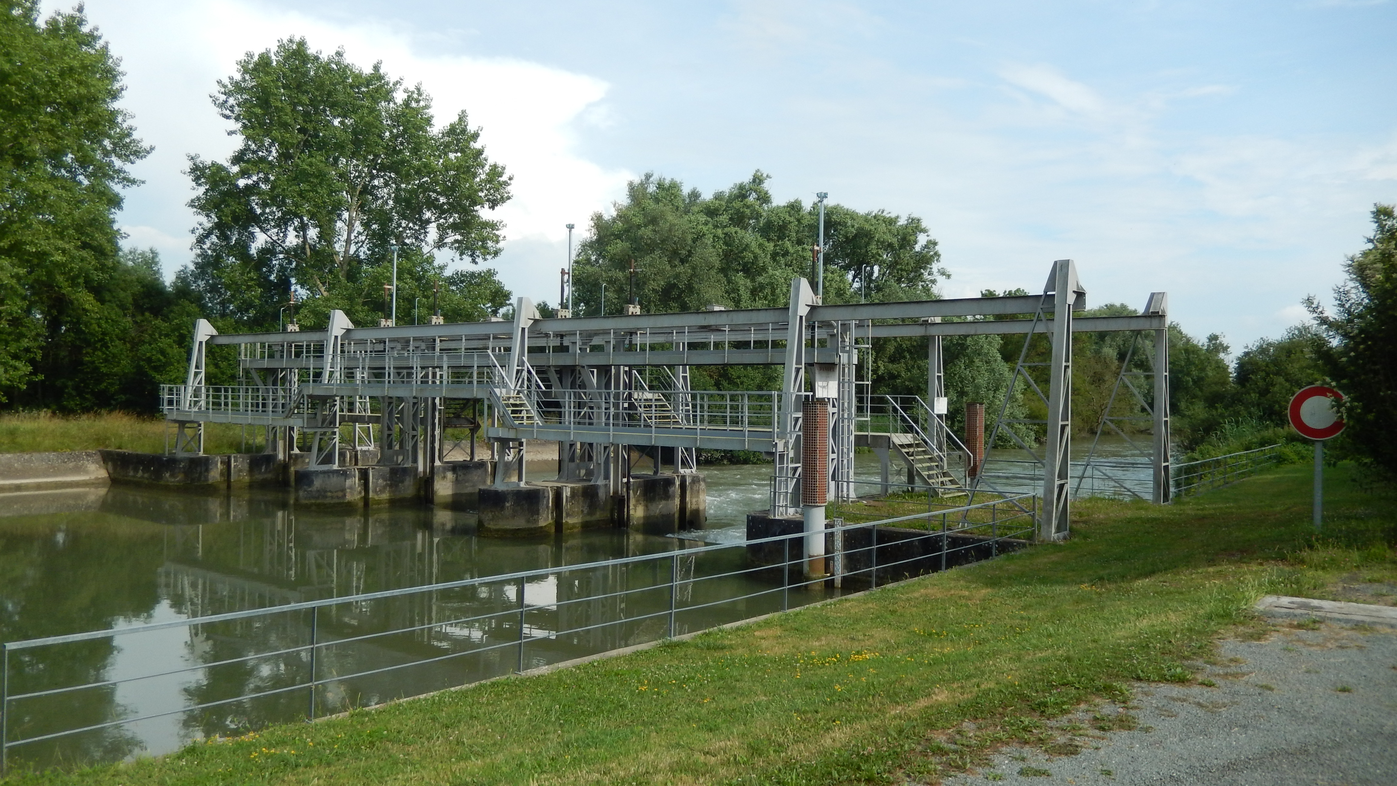 Le barrage de Carillon situé sur la rivière Boutonne avant son confluent avec le fleuve Charente. Commune de Cabariot (Charente-Maritime, France).